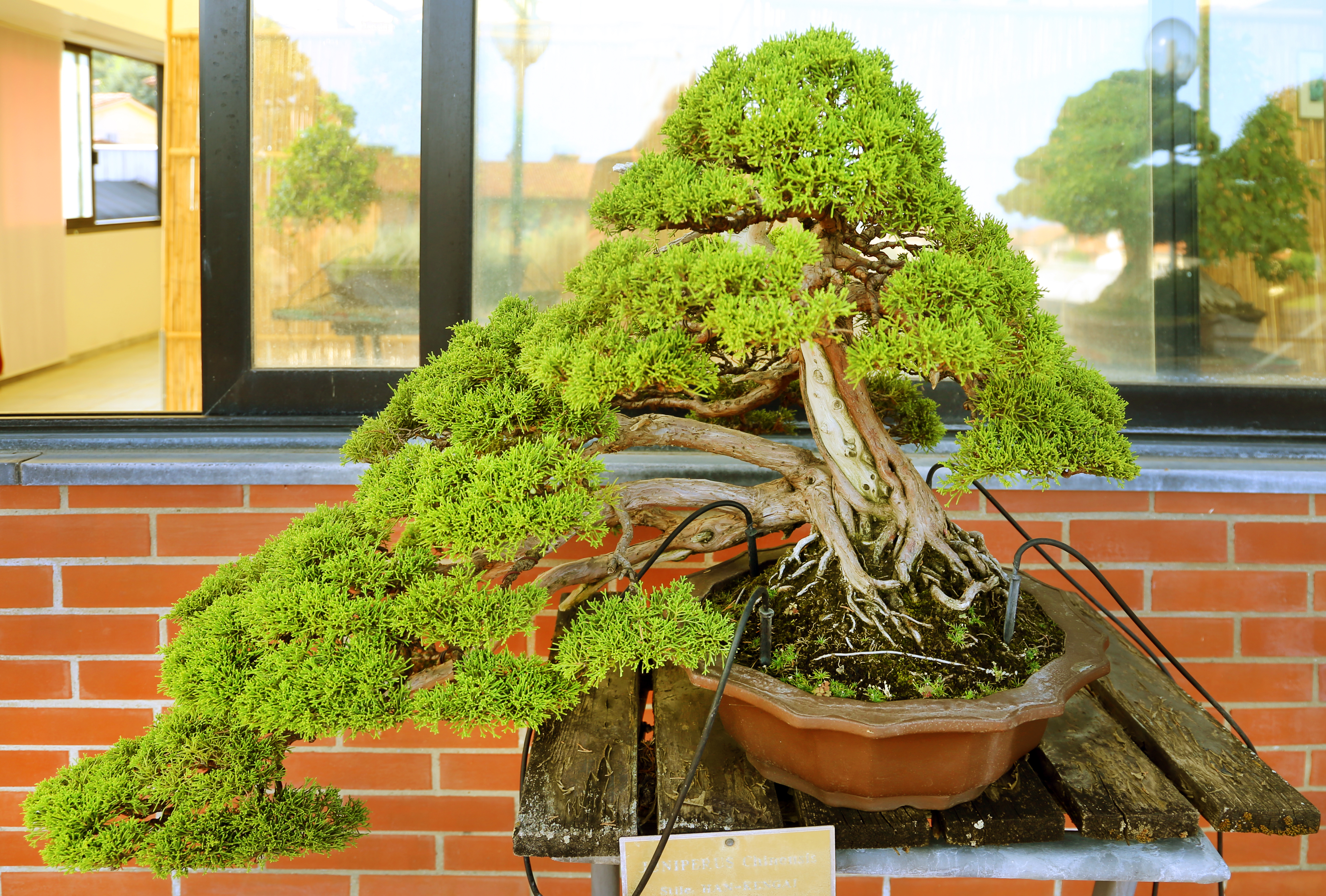 Museo del bonsai This is a photo of a monument which is part of cultural heritage of Italy.